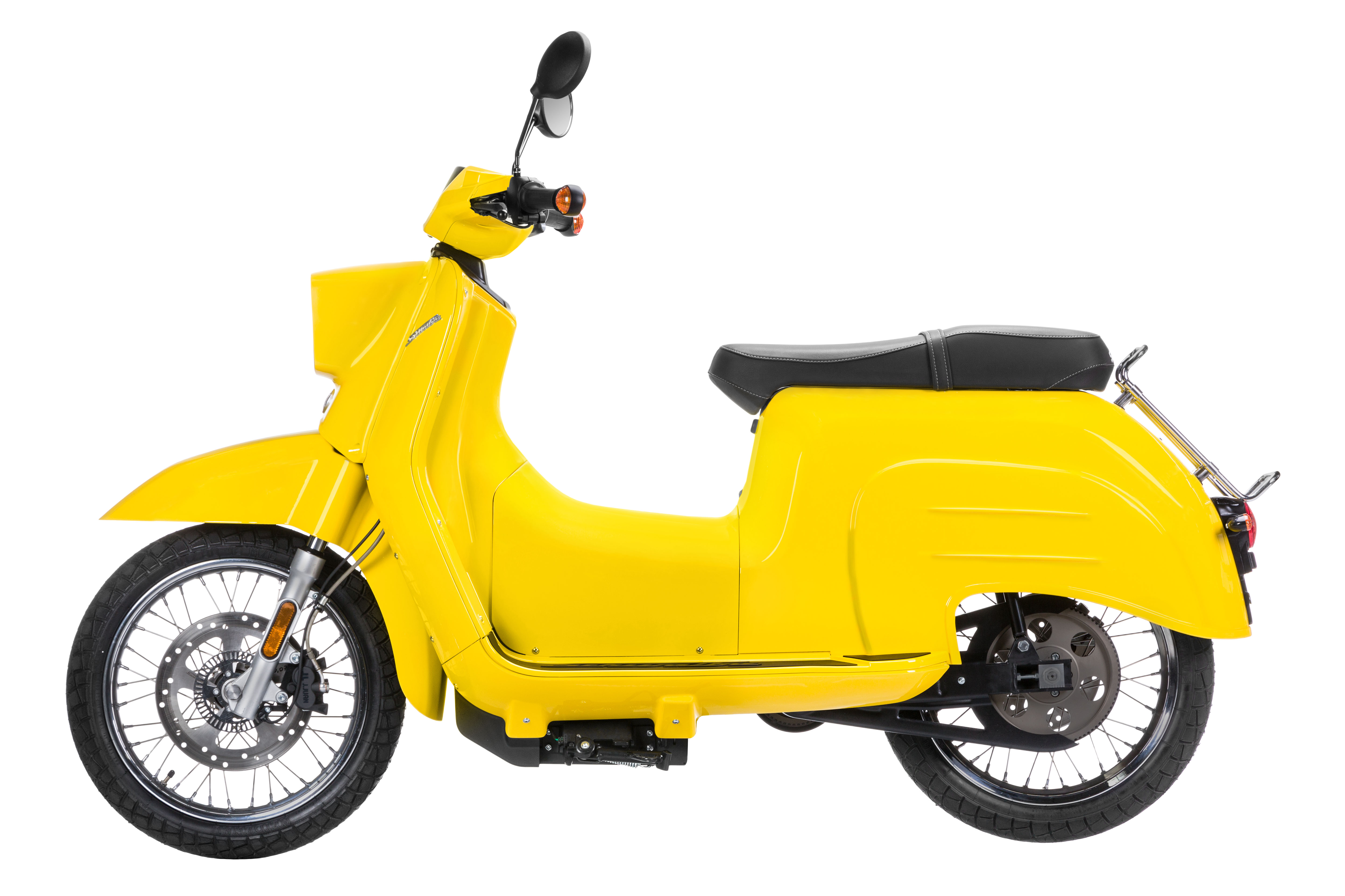 Side Shot Schwalbe left